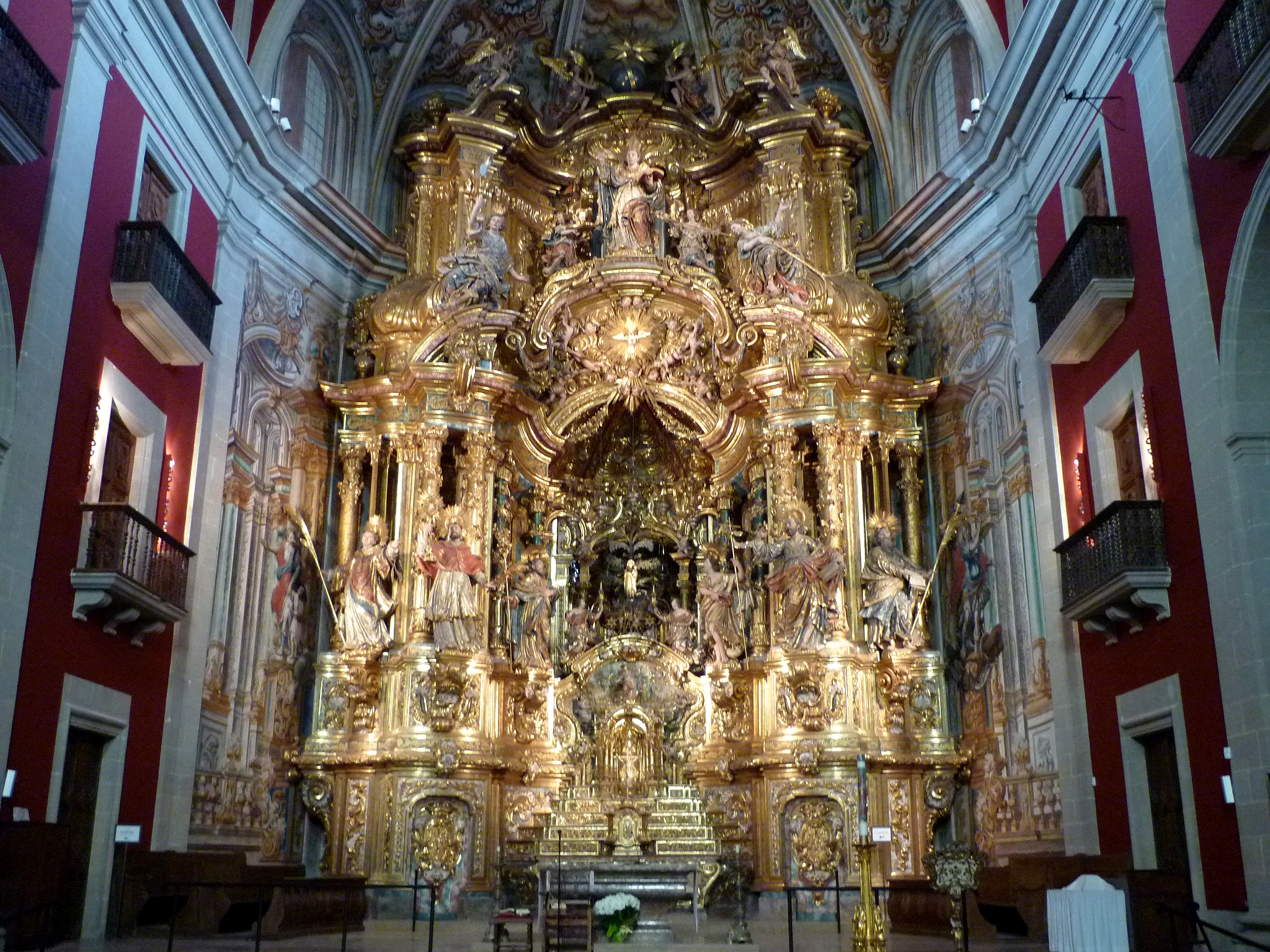 Santuari del Miracle (Riner): Retaule